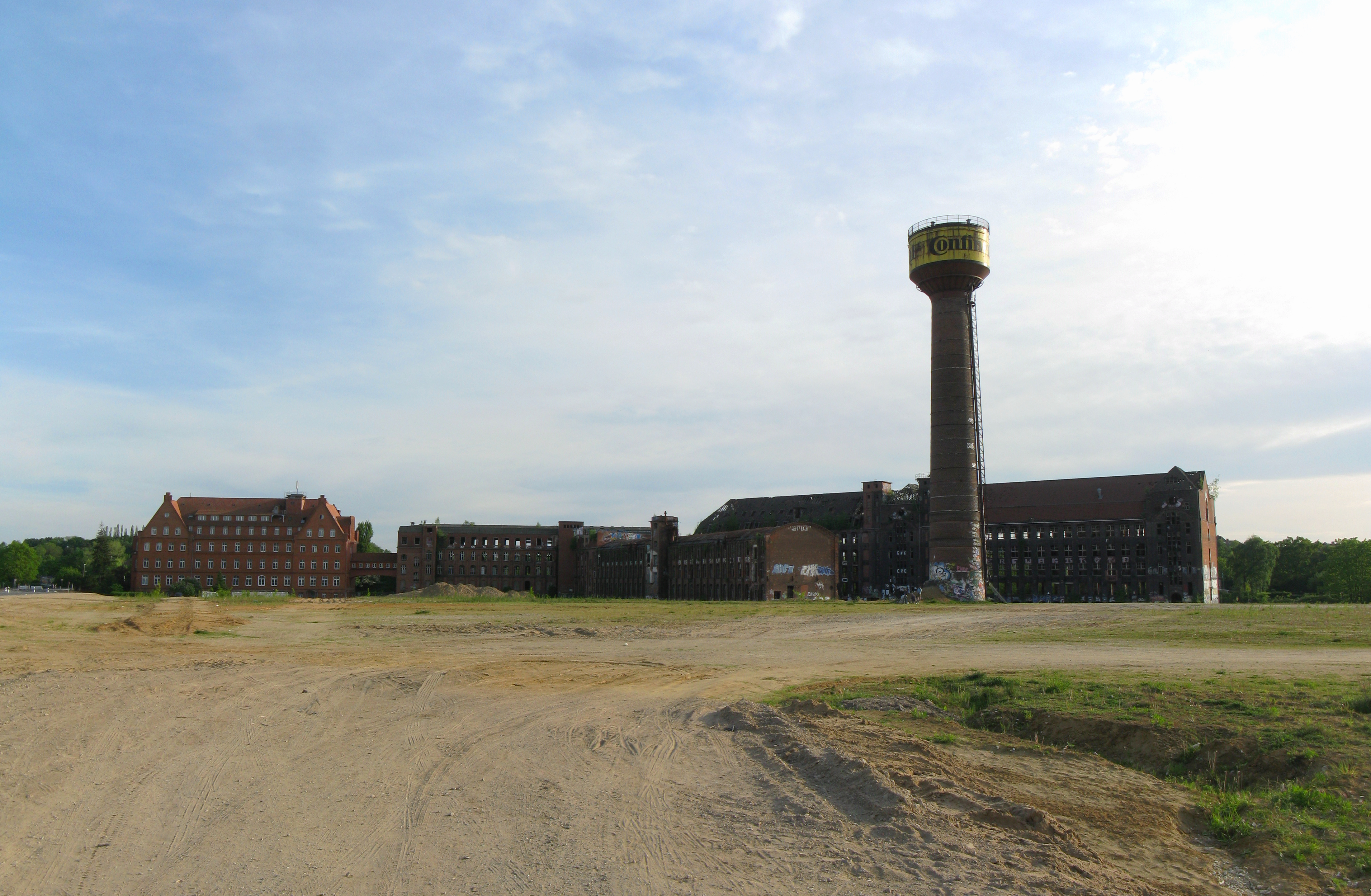 Panorama des ehemaligen Fabrikgebäudes der Continental AG in Hannover-Limmer